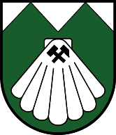 St. Jakob in Defereggen. St. Jakob in Defereggen In Grün eine silberne Muschel, mit den schwarzen Bergwerkszeichen Schlägl und Eisen belegt, im Schildhaupt eine ganze und zwei halbe gestürzte silberne Spitzen.